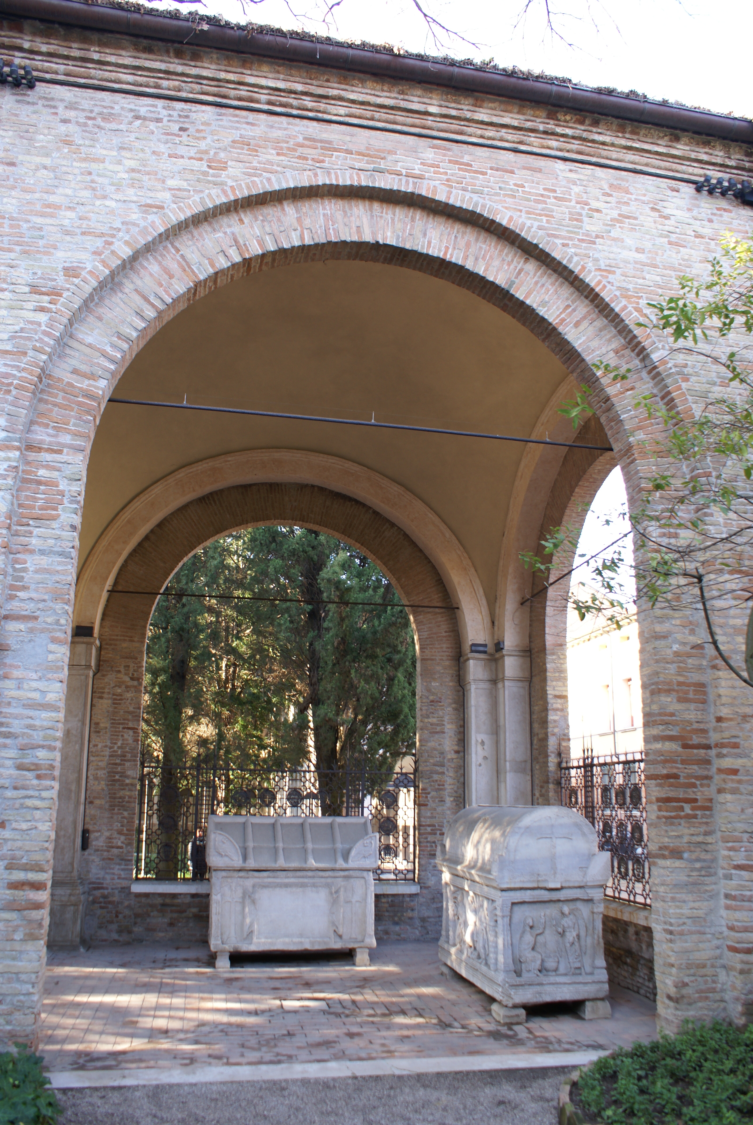 Zona Dantesca e Tomba di Dante This is a photo of a monument which is part of cultural heritage of Italy.